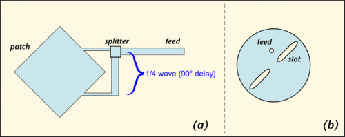 Polarización circular.